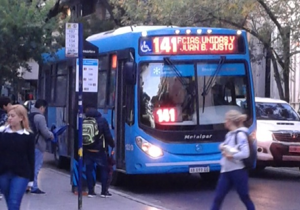 Mercedes-Benz de la empresa Movi, explotadora de la línea 141